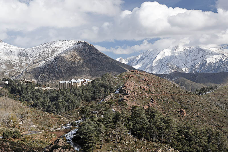 Vue sur Tikjda